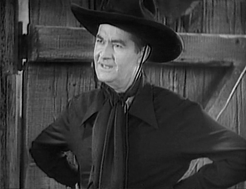 El actor George Hayes en una imagen de Randy cabalga solo.